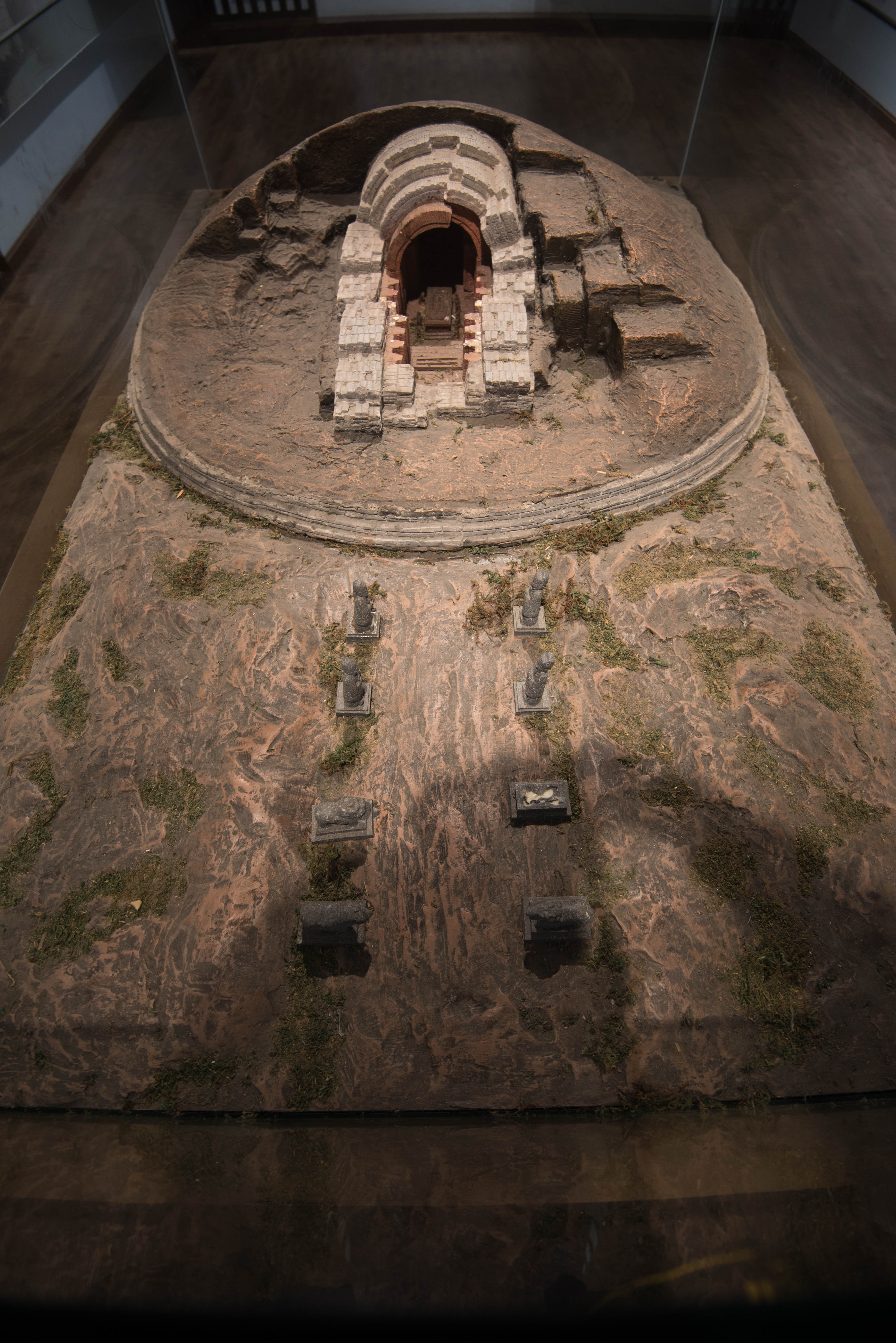 王建墓，2017-09-18